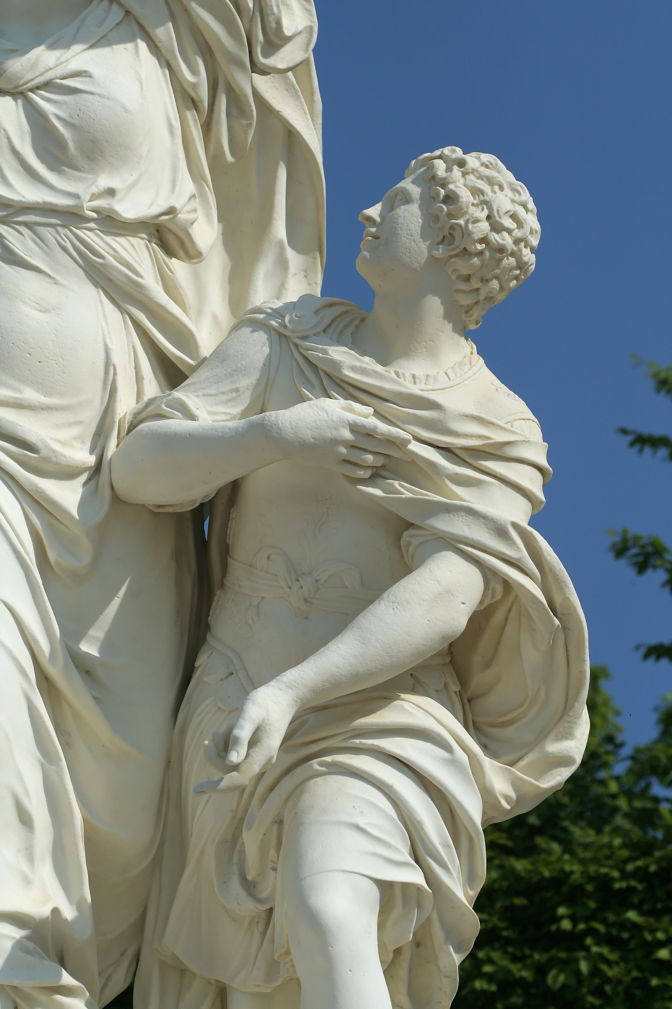 Parc de Versailles, demi-lune du bassin du Char-d'Apollon. Ino frappée de folie par Junon se jetant dans la mer avec son fils Melicerte, par Pierre Granier, 1686-1691, h. 3 m, marbre. inv1850n°9138